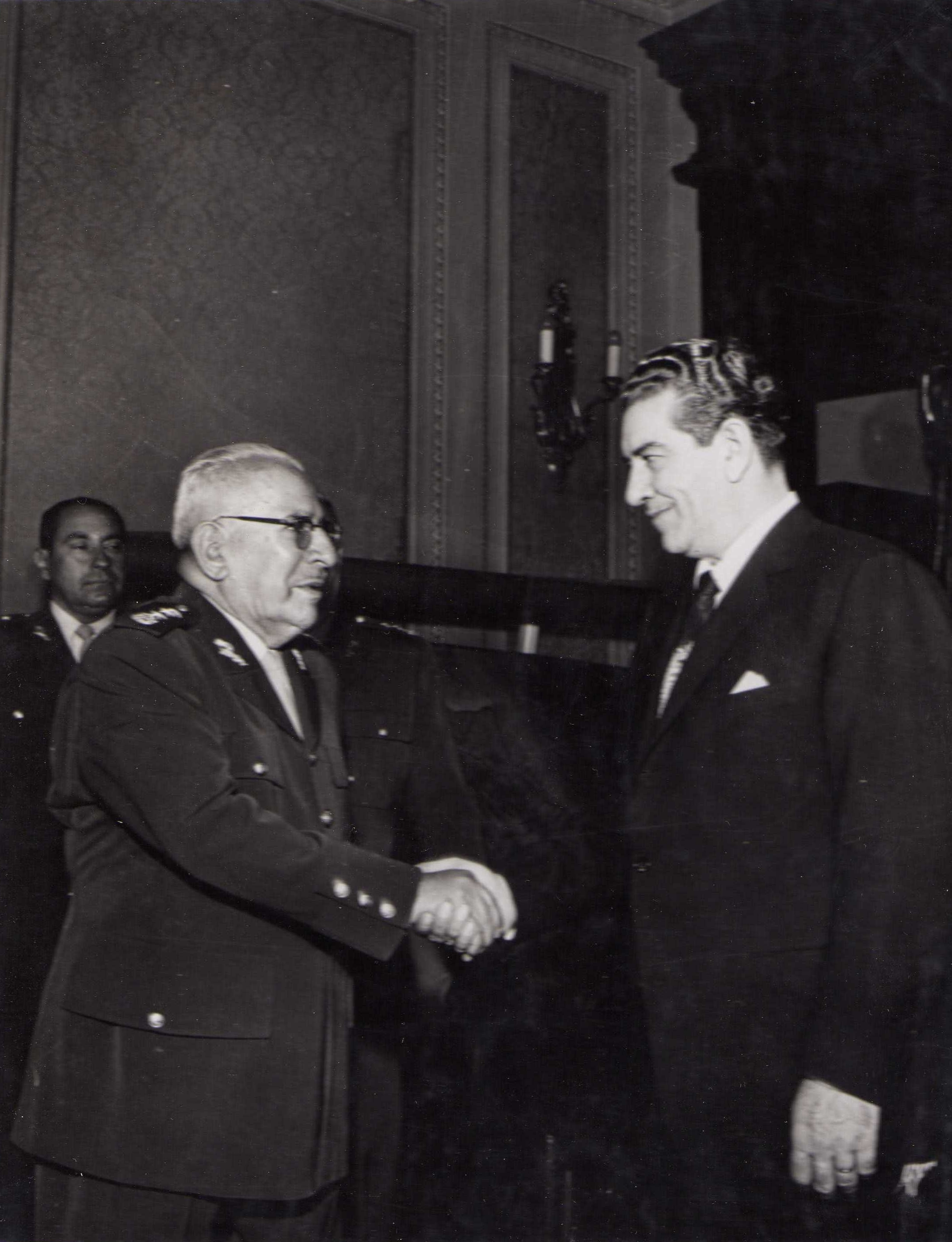 El Presidente Adolfo López Mateos con el Secretario de la Defensa Nacional, Gral. de Div. Agustín Olachea Avilés.